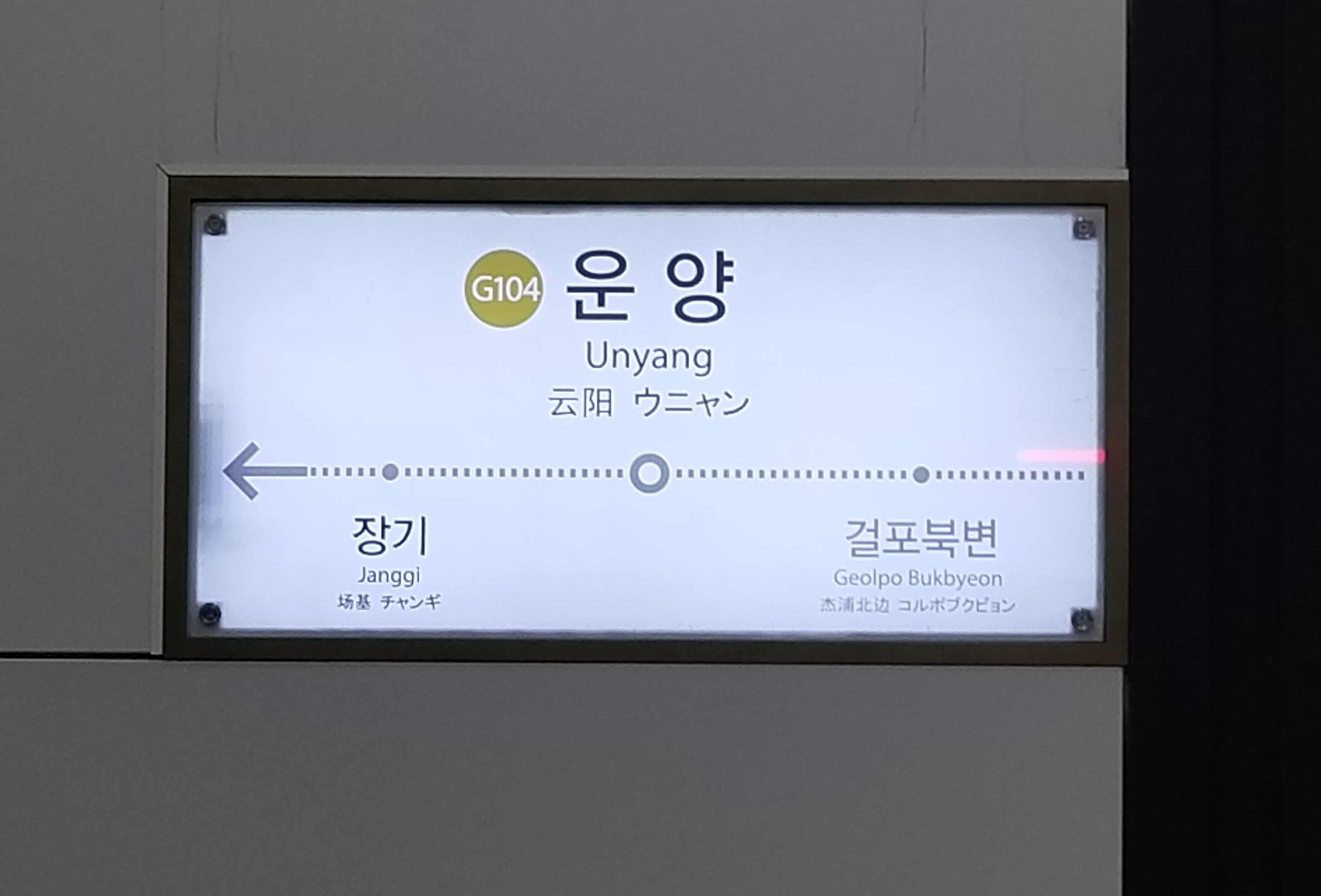 김포도시철도 운양역 역명판